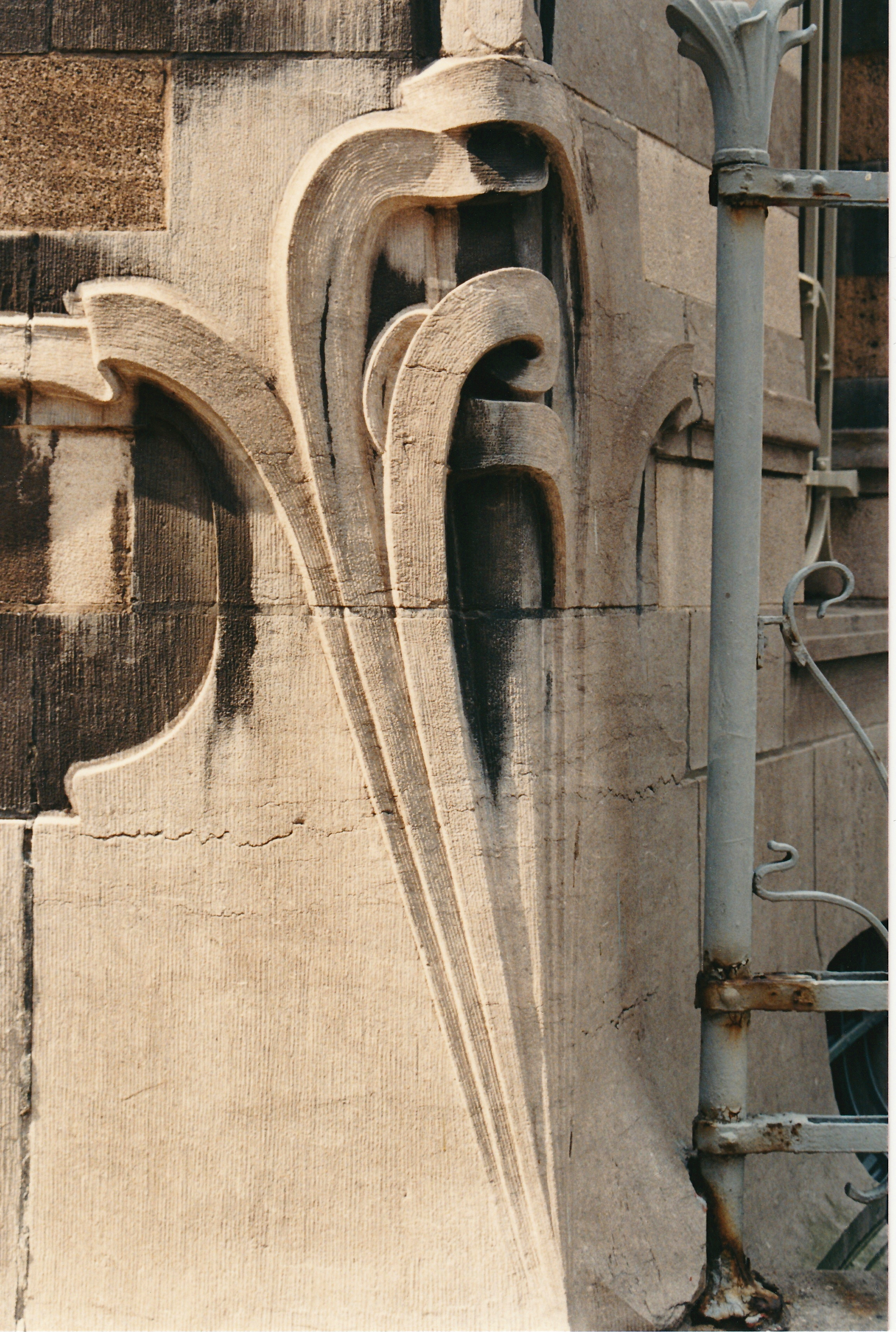 Belgique - Bruxelles - Hôtel Deprez-Van de Velde (Art nouveau, architecte Victor Horta, 1895-1896)